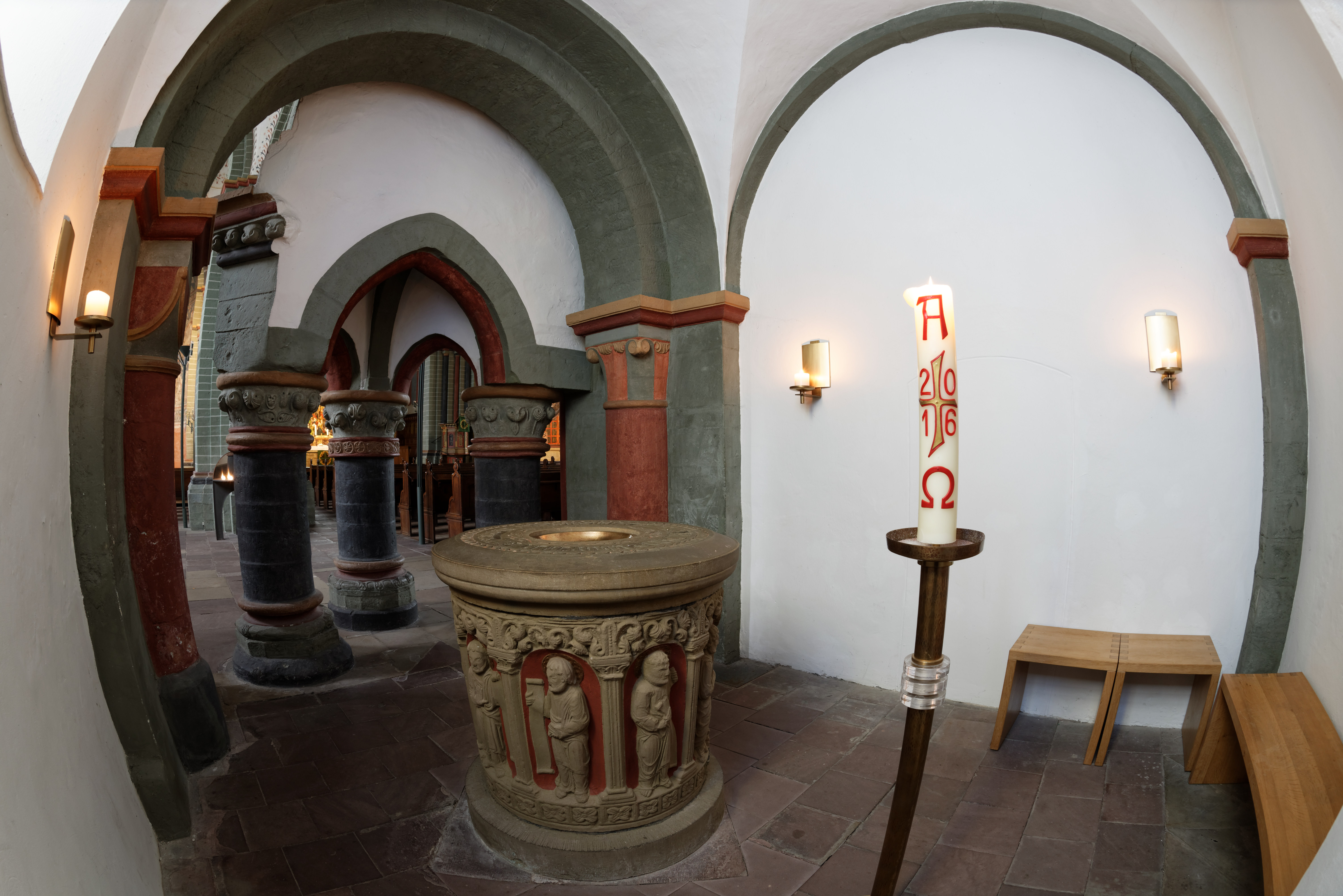 Taufkapelle in der Kirche St. Maria zur Höhe in der Stadt Soest im Kreis Soest in Nordrhein-WestfalenThis is a photograph of an architectural monument., no. 363